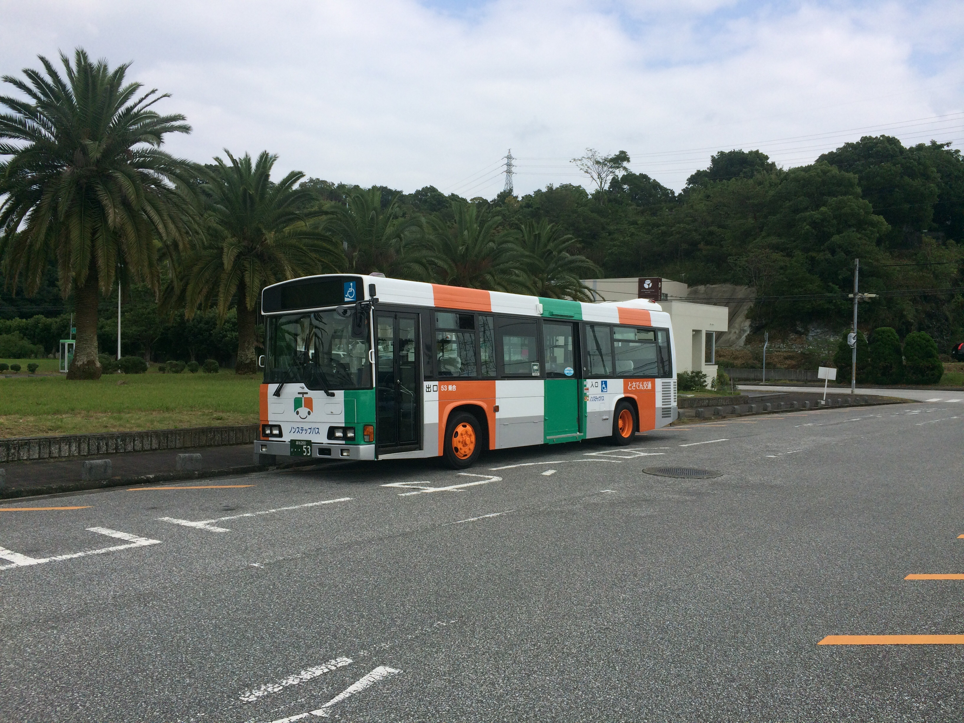 とさでん交通